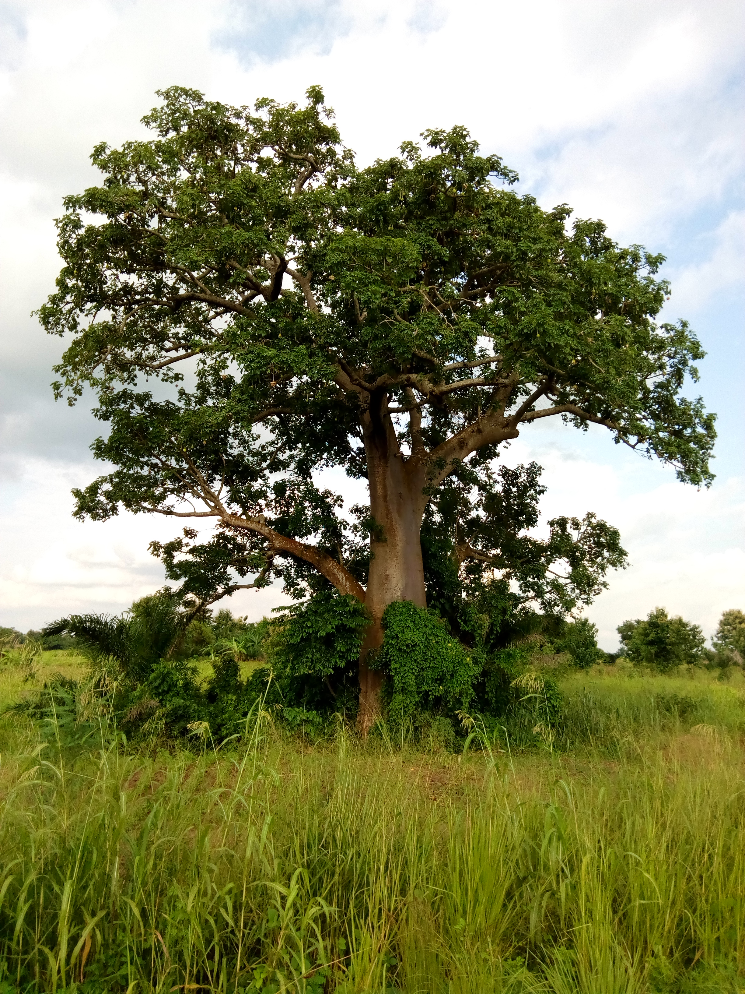 baobab à issaba Pobé